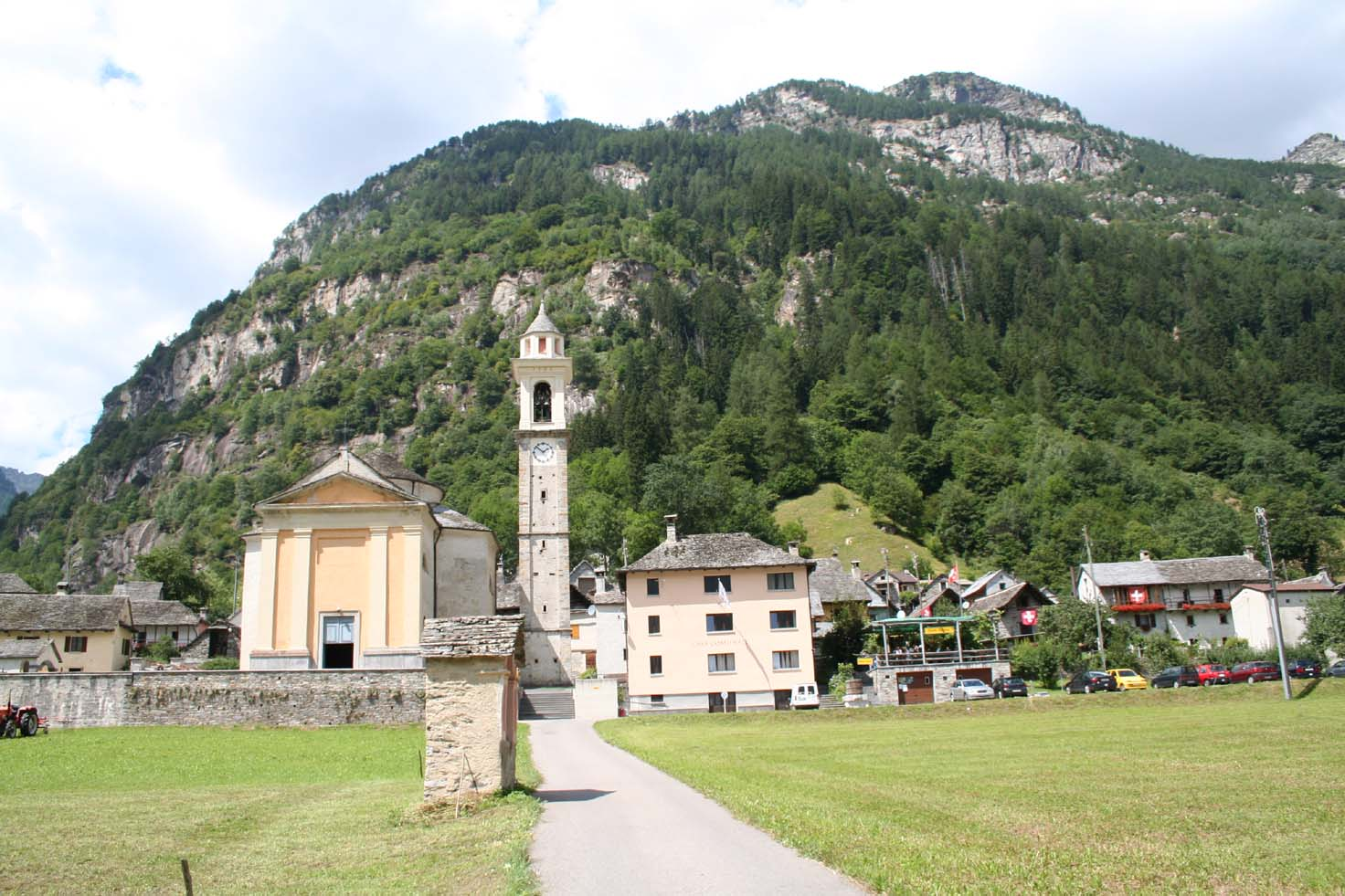 Sonogno TI